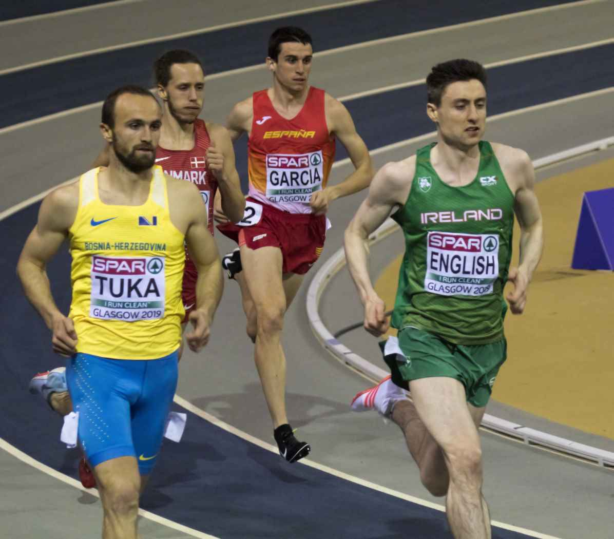 EKI30356 finale 800m man tuka english